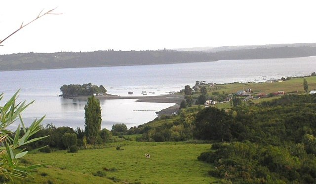 Quinched e Isletilla, comuna de Chonchi, Chile